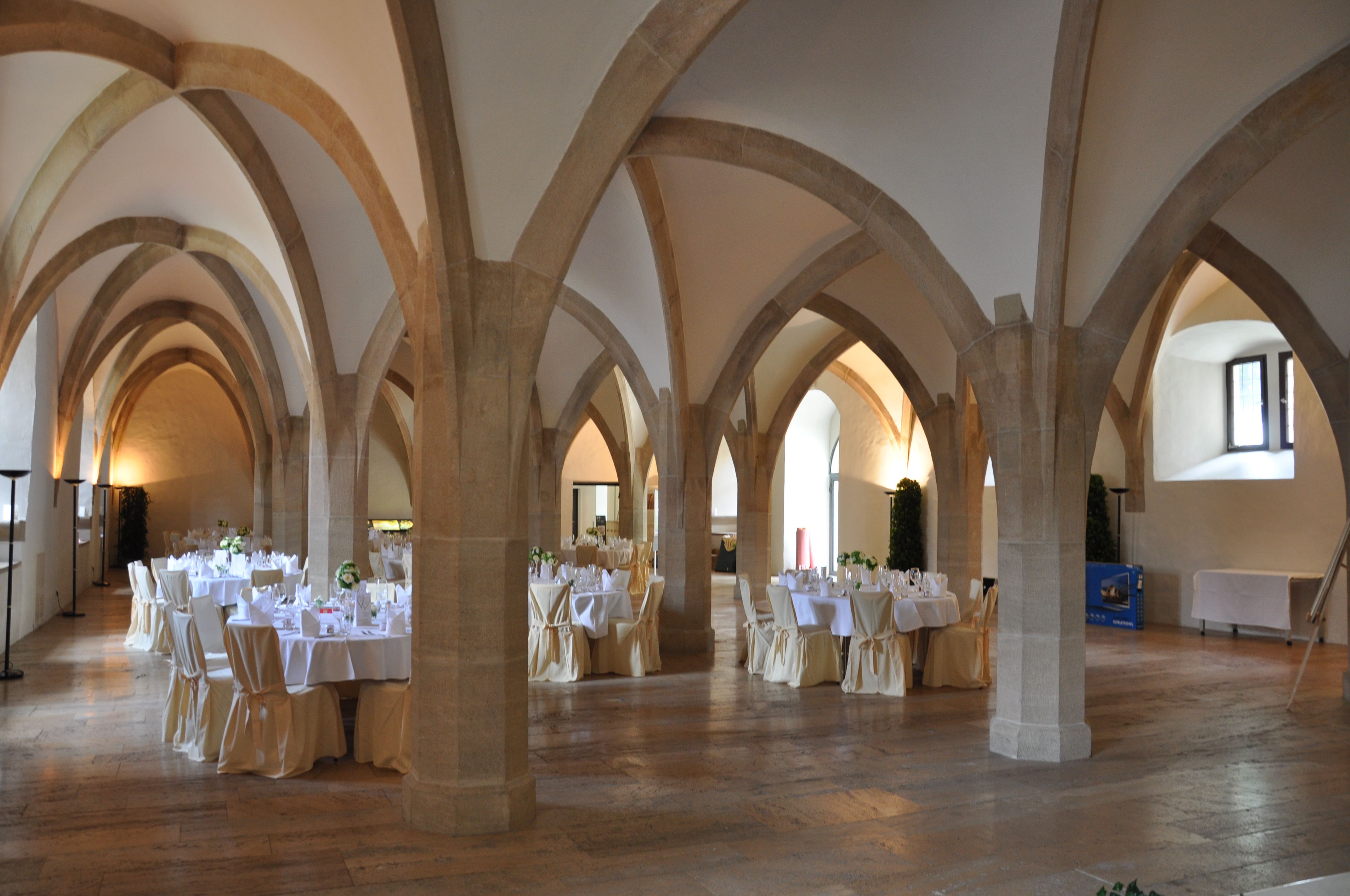 Schloss Urach, "Dürnitz" im Erdgeschoss (Saal mit Gewölbe von 1474)